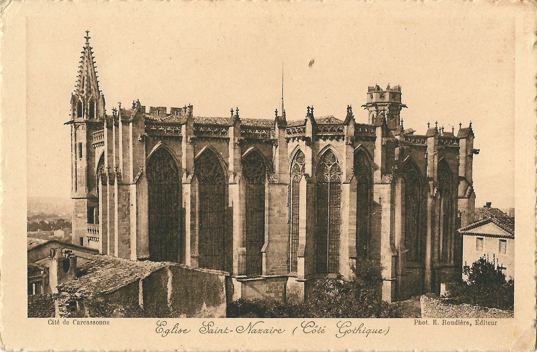 Carcassonne (Aude, France) ; carte postale des éditions Roudière. Avant 1940